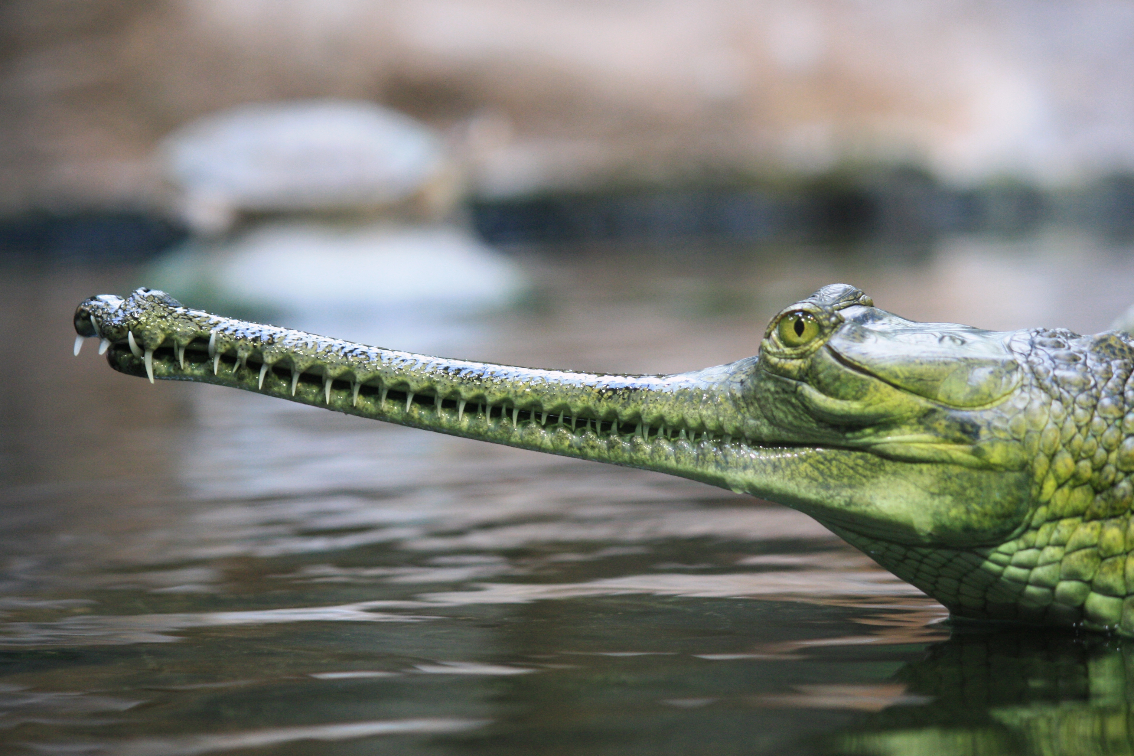 Česky: Gaviál indický v pražské Zoo